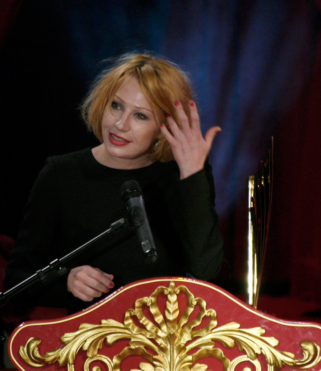 Birgit Minichmayr, ausgezeichnet als Beste Schauspielerin, während der Verleihung des Nestroy-Theaterpreises 2009 (Circus Roncalli auf dem Wiener Rathausplatz).